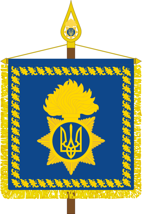 Штандарт, Командувач Національної гвардії України, 2017.